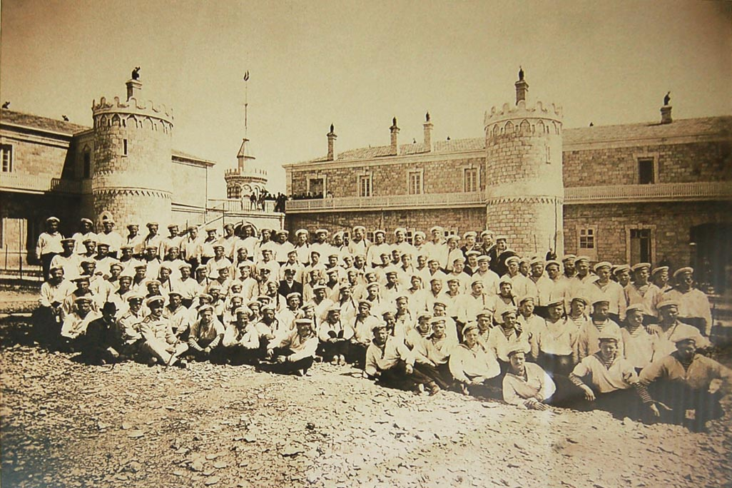 Русские военные моряки на Сергиевском подворье. Команда фрегата "Владимир Мономах" во дворе Сергиевского подворья.